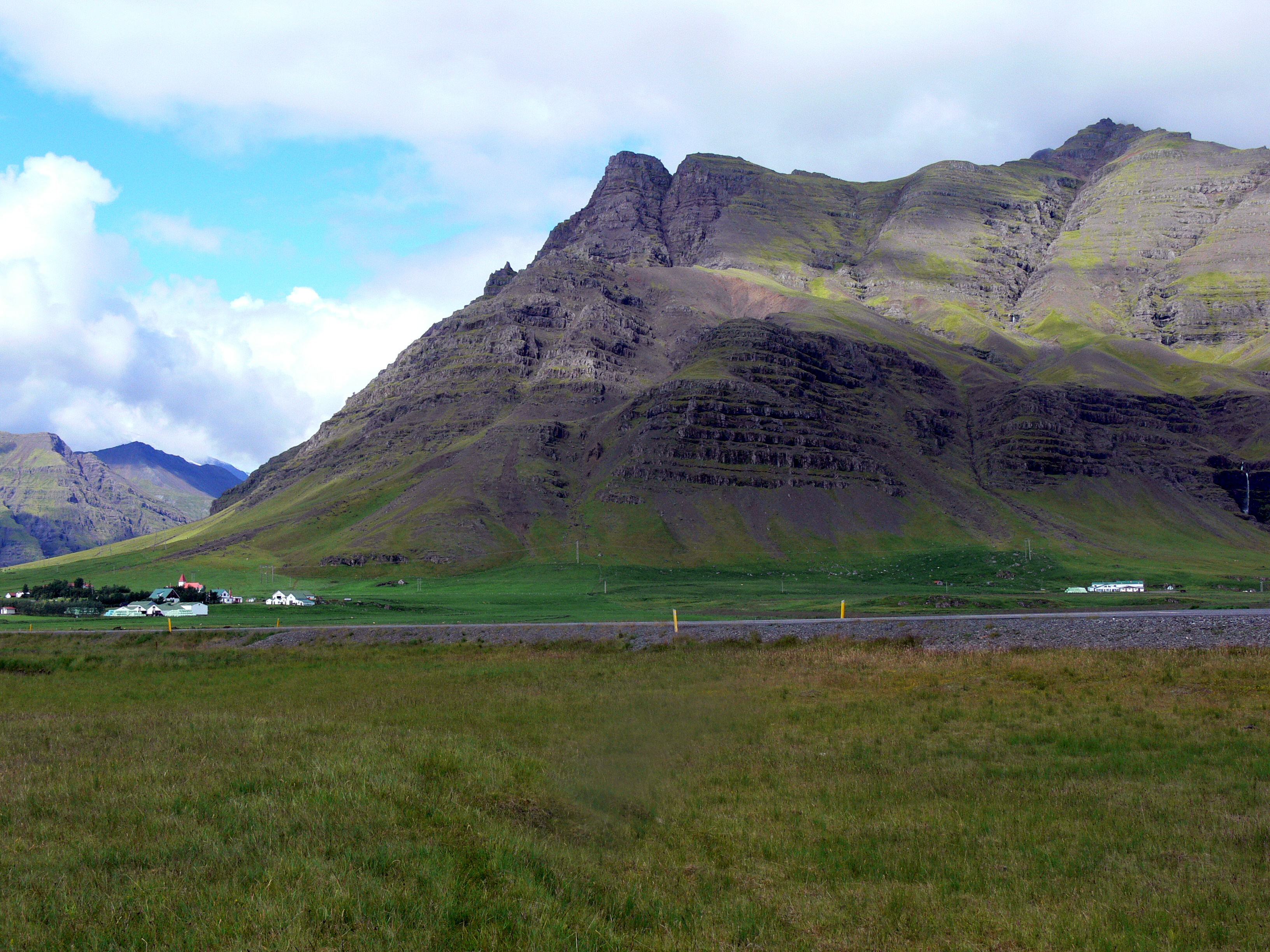 Kálfafellsstaður mit dem Berg Kálfafellstindur.